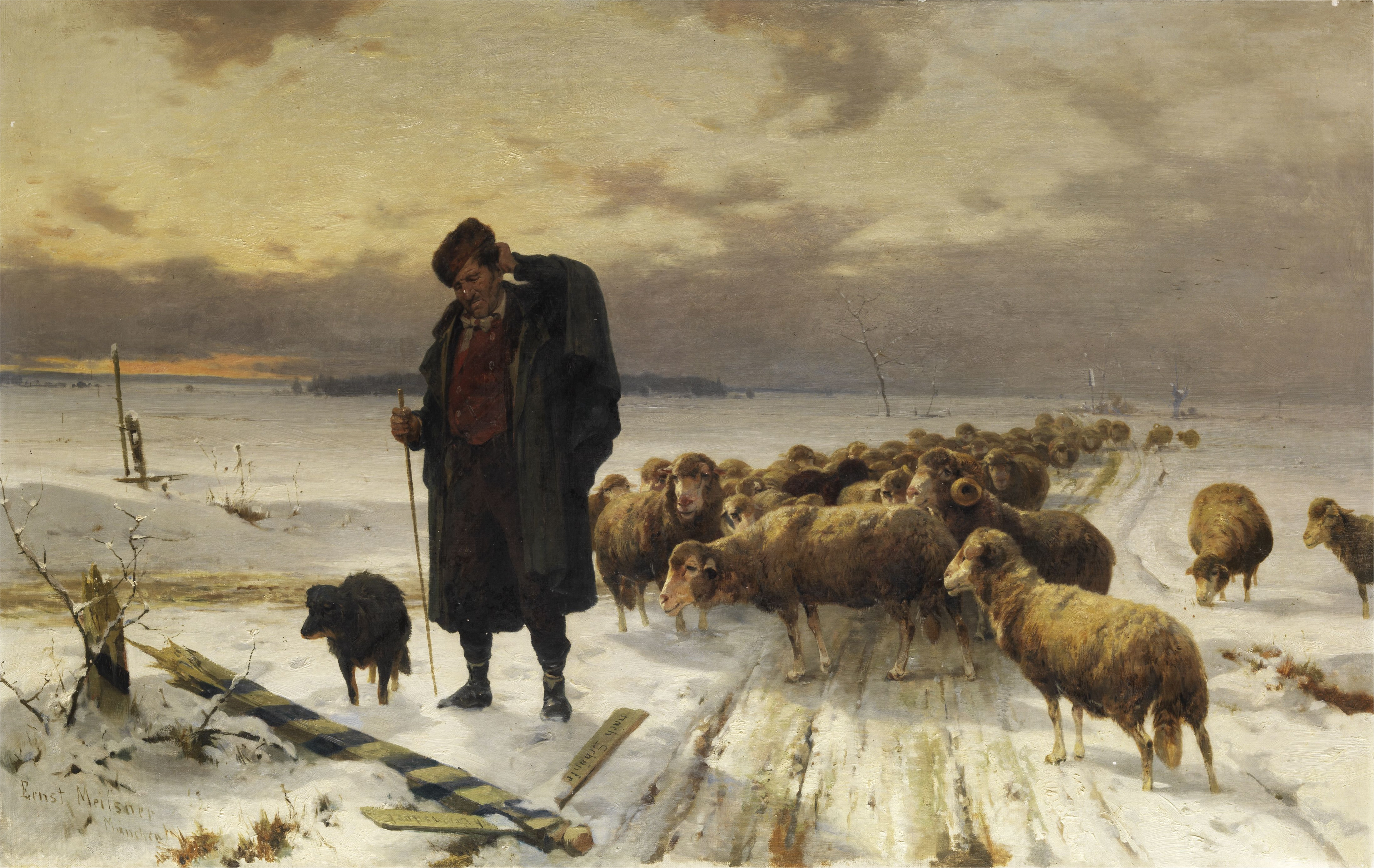 Schäfer mit Herde in Winterlandschaft. Öl auf Leinwand. 64 x 101 cm. Links unten signiert und ortsbezeichnet „München“. Provenienz: Ehemals im Besitz des Erbgroßherzogs von Oldenburg.